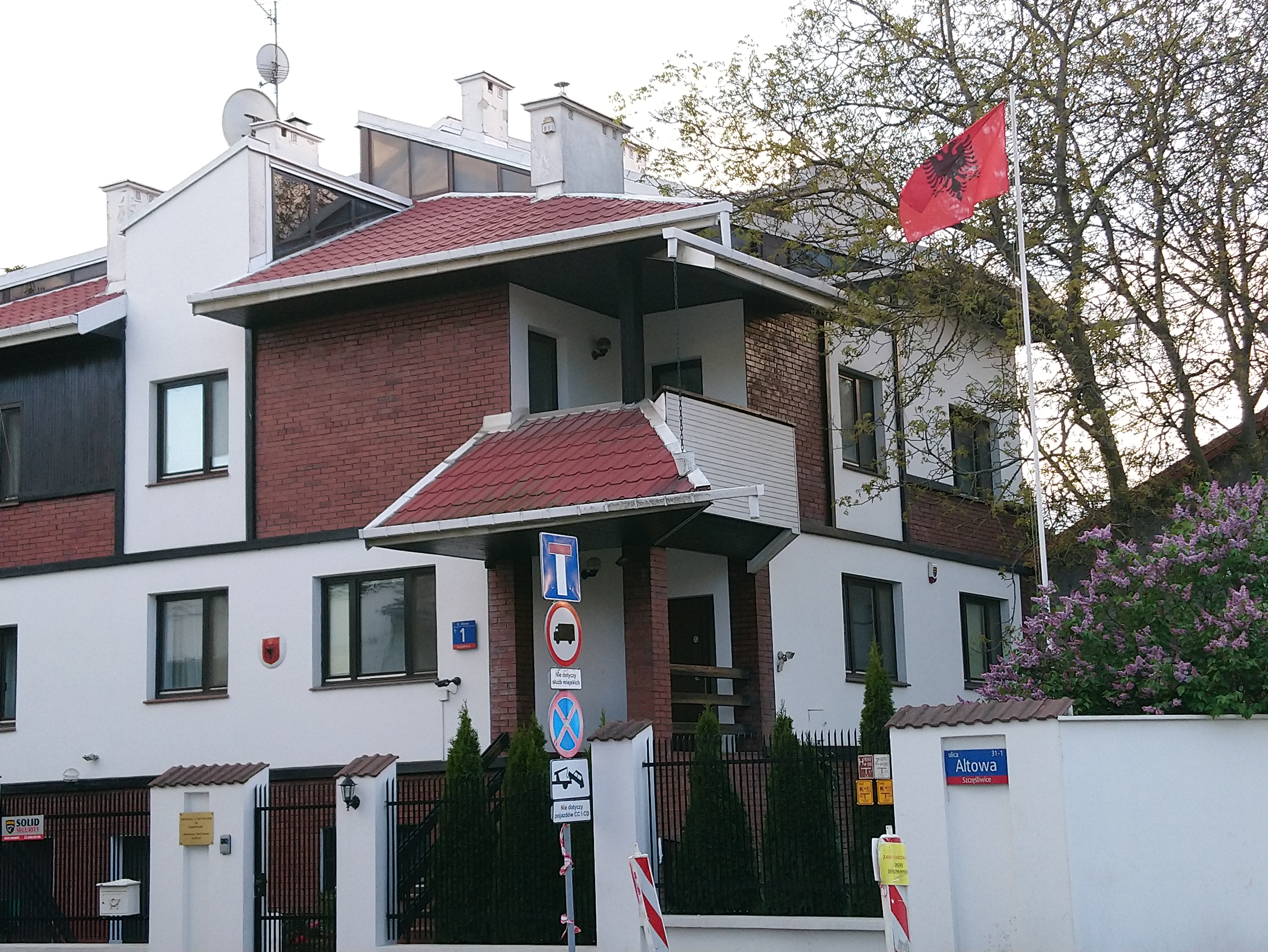 Ambasada Albanii w Warszawie